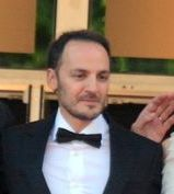 L'équipe du film "Deux jours, une nuit" au festival de Cannes